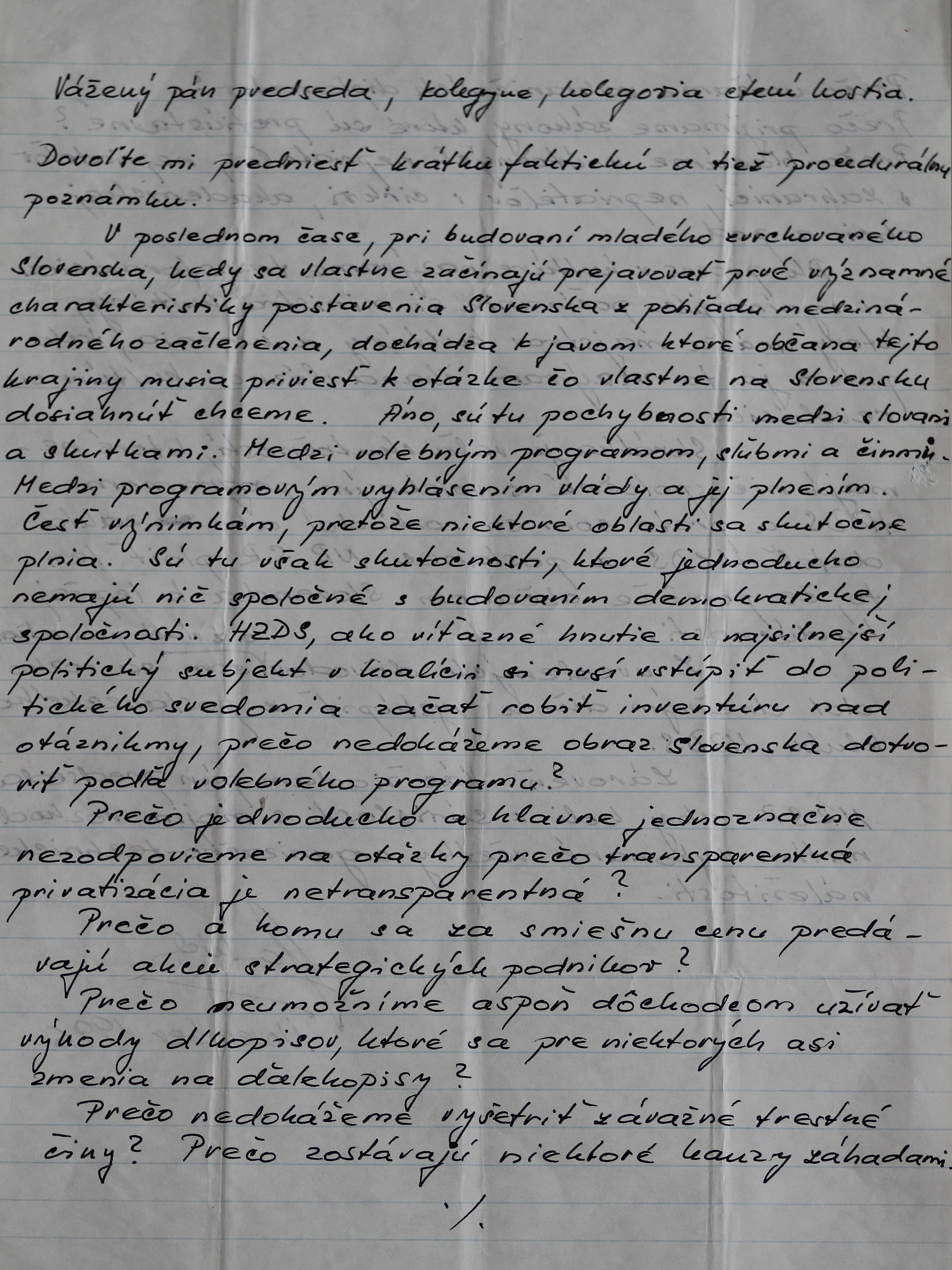 Gaulieder František